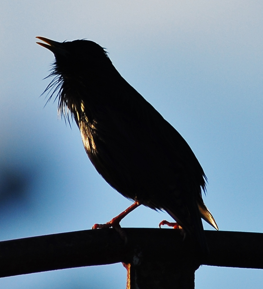 depois do duche. Leziria grande de vila franca de xira.